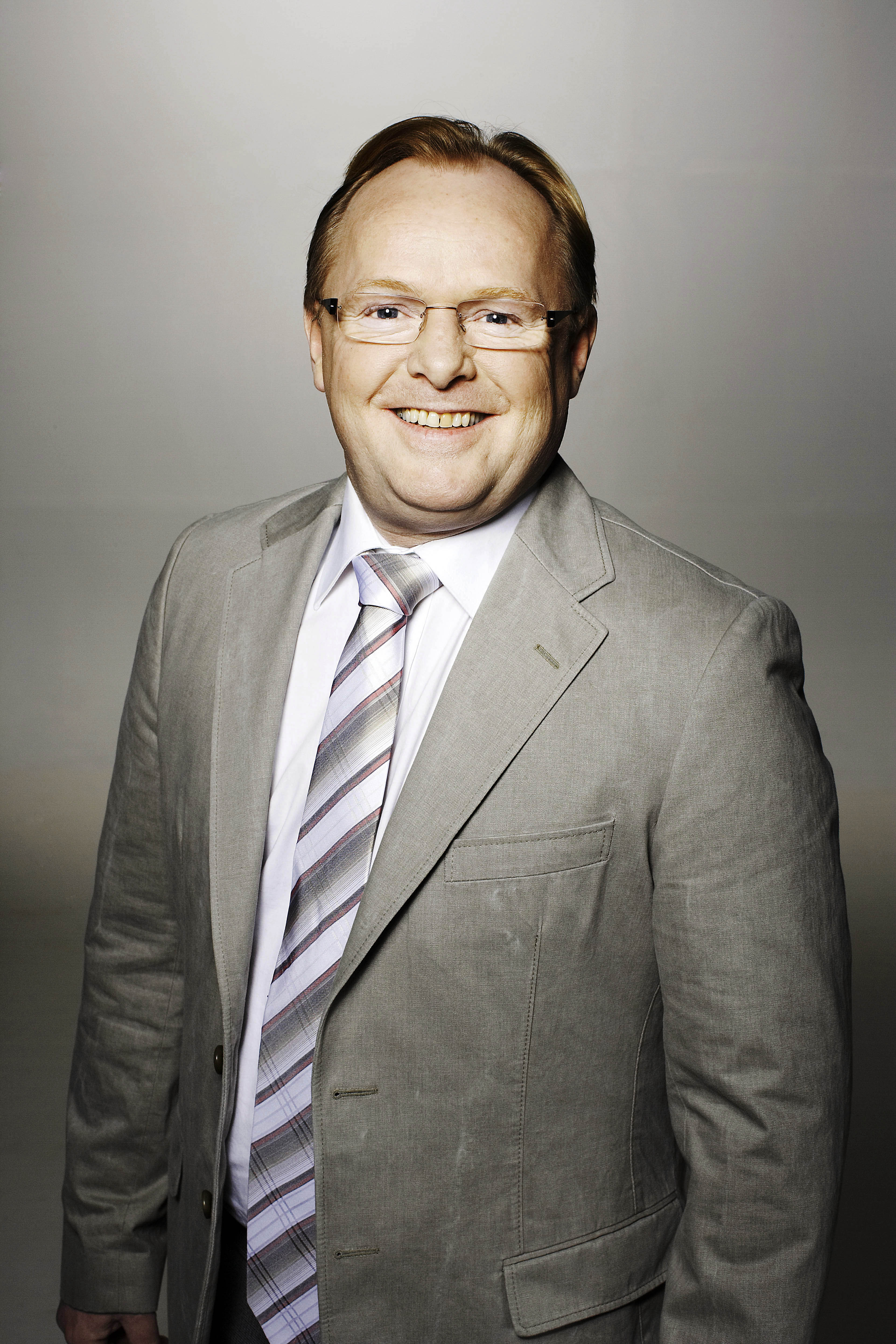 Per Sandberg, FrP-politiker